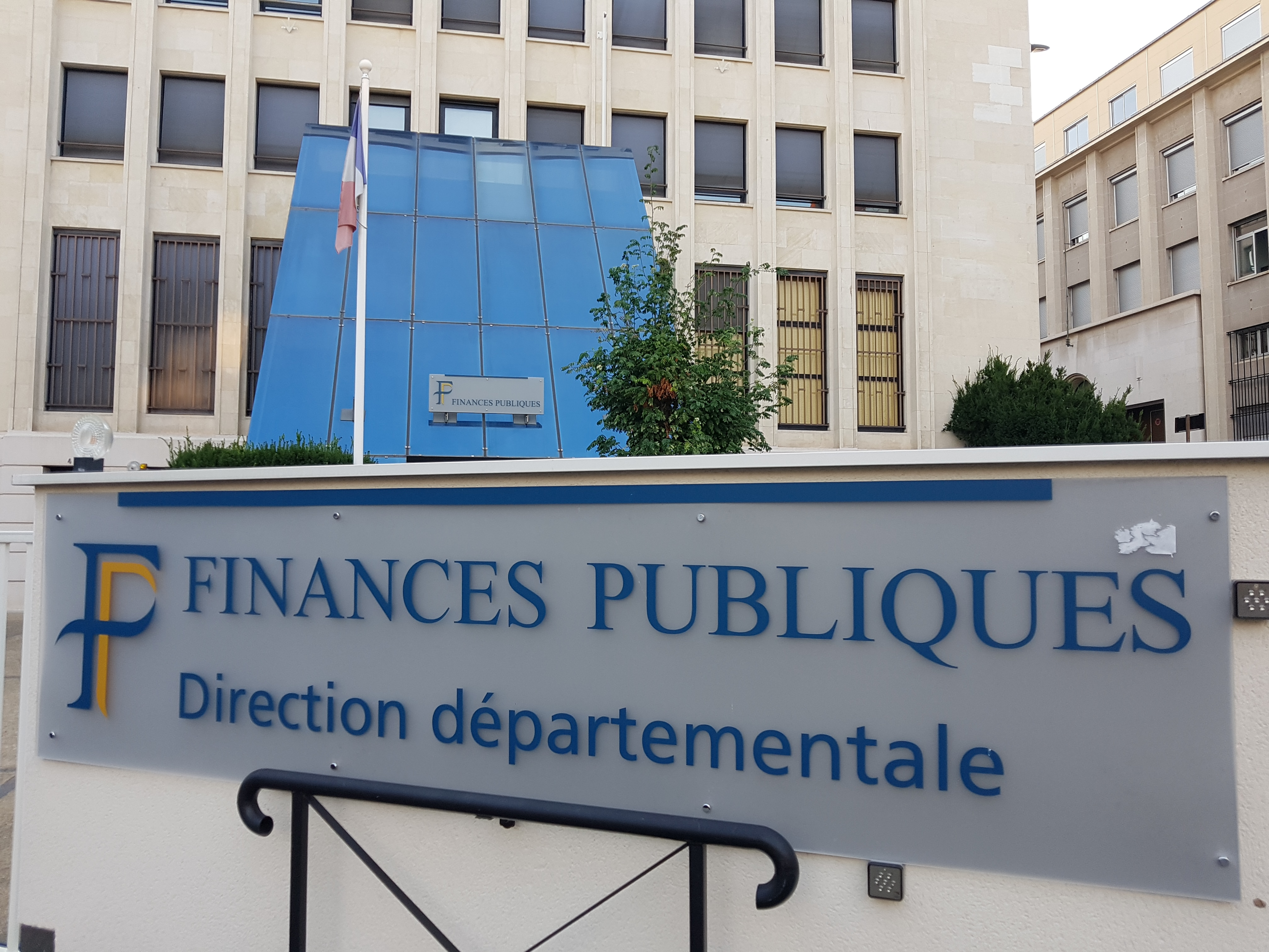 Centre des finances publiques départementales du Puy-de-Dôme (Clermont-Ferrand)